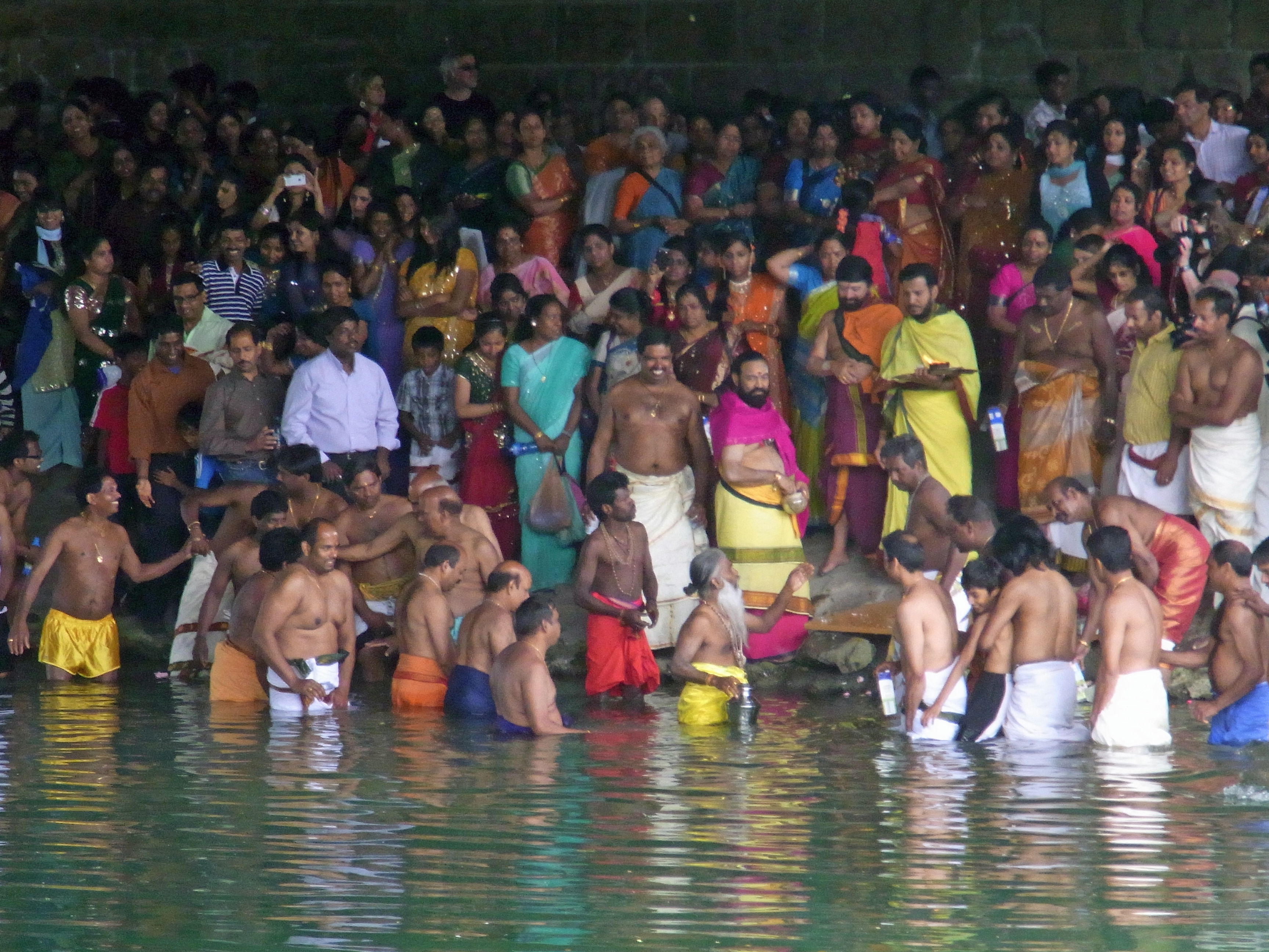 Sri-Kamadchi-Ampal-Tempel: Tempel Festival 2011, Prozession zum Kanal